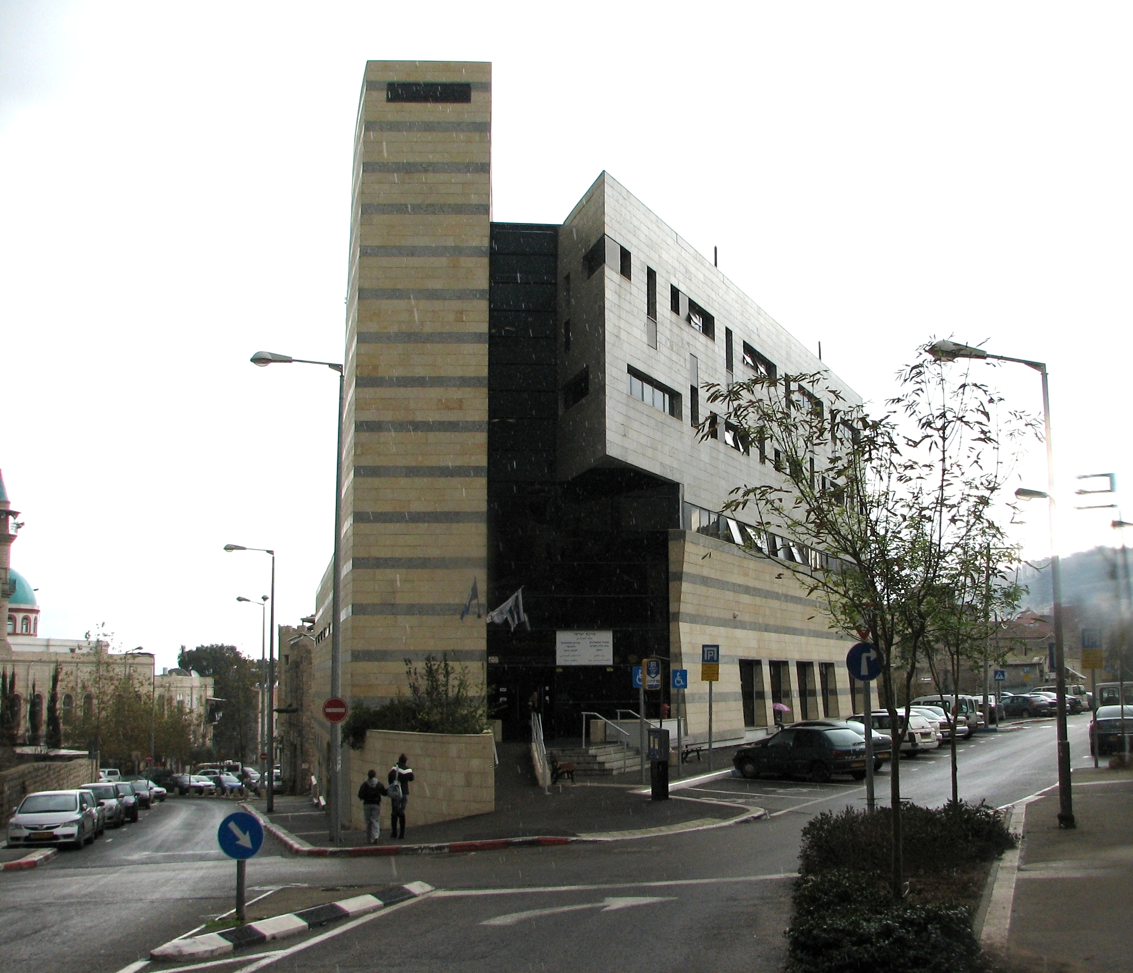 Wadi Salib in Downtown Haifa. ואדי סאליב היא שכונה ברובע העיר התחתית בחיפה. הוקמה בסוף המאה ה-19 על ידי ערבים שיצאו מחומות העיר העתיקה של חיפה. השכונה ננטשה אט אט. בתחילת המאה ה-21 החלה עיריית חיפה בפרויקט שיקום השכונה והפיכתו לרובע אמנים מבנה בית הדיו השרעי בחיפה בשכונת ואדי סאליב. פינת קיבוץ גלויות ושיבת ציון